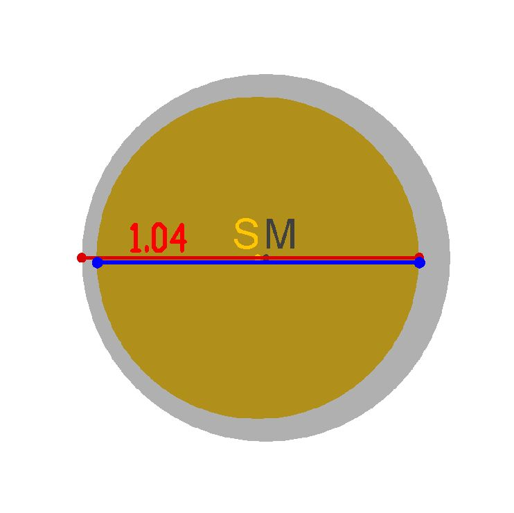 Änderung des Quellbildes File:Eclipse Magnitude.png